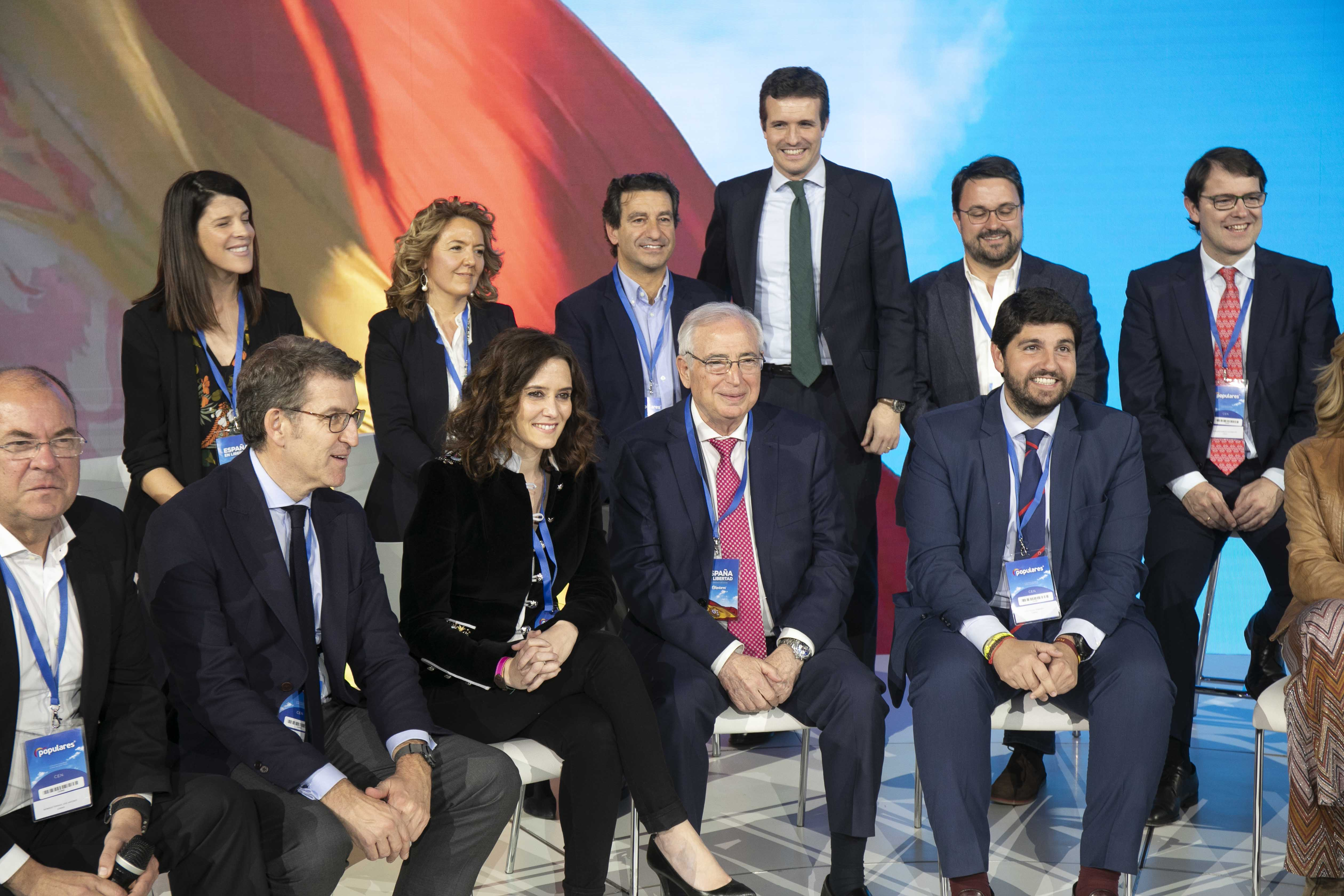 Jornada apertura Convención 2019 Partido Popular.